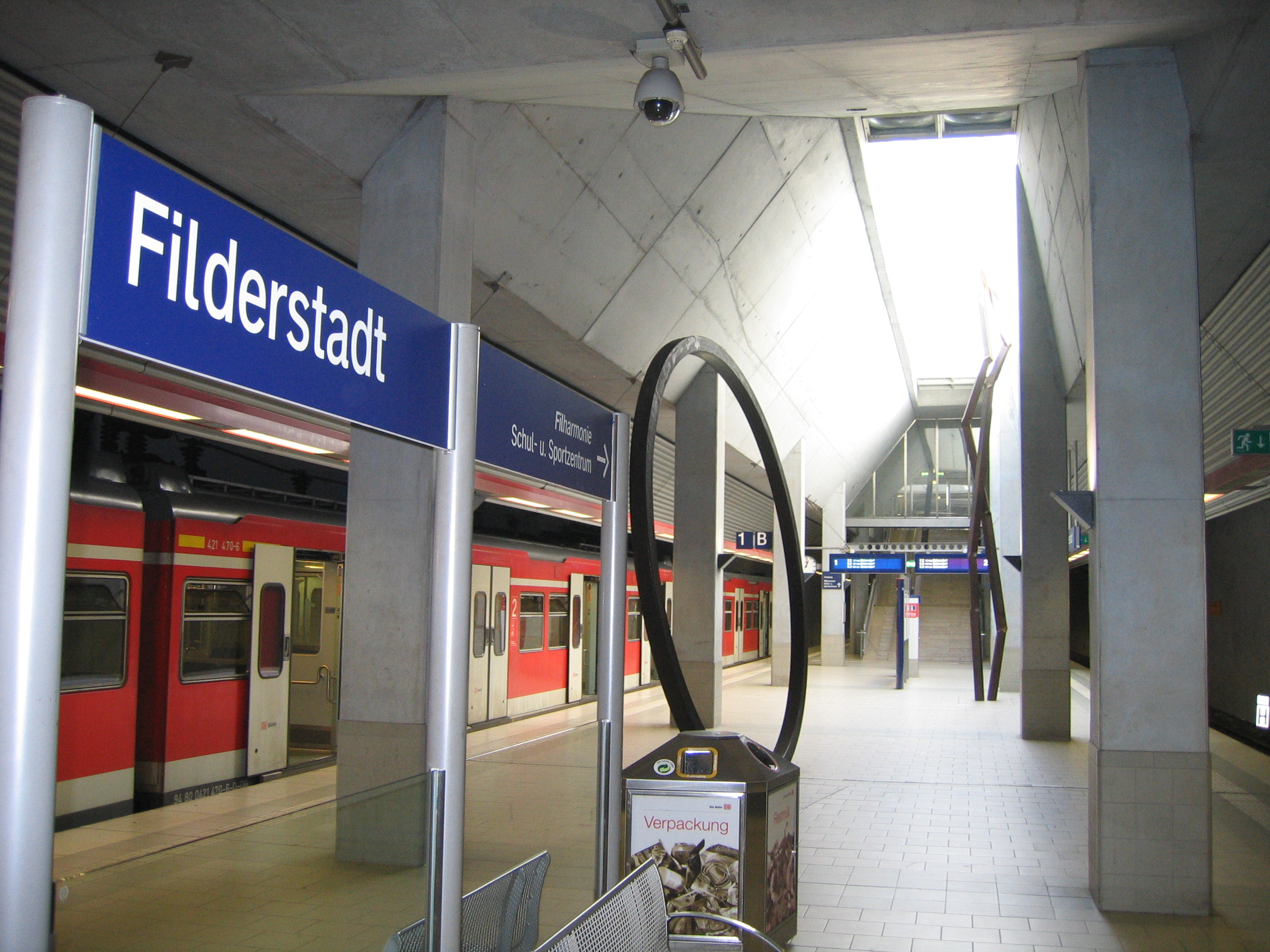 Bahnhof Filderstadt